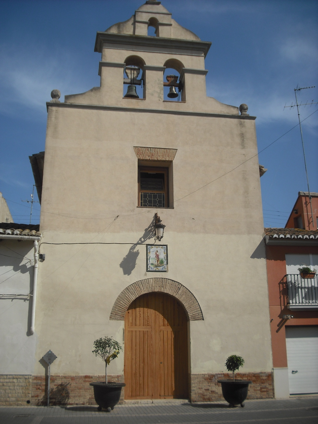 Ermita de Sant Joan de Mirambell.